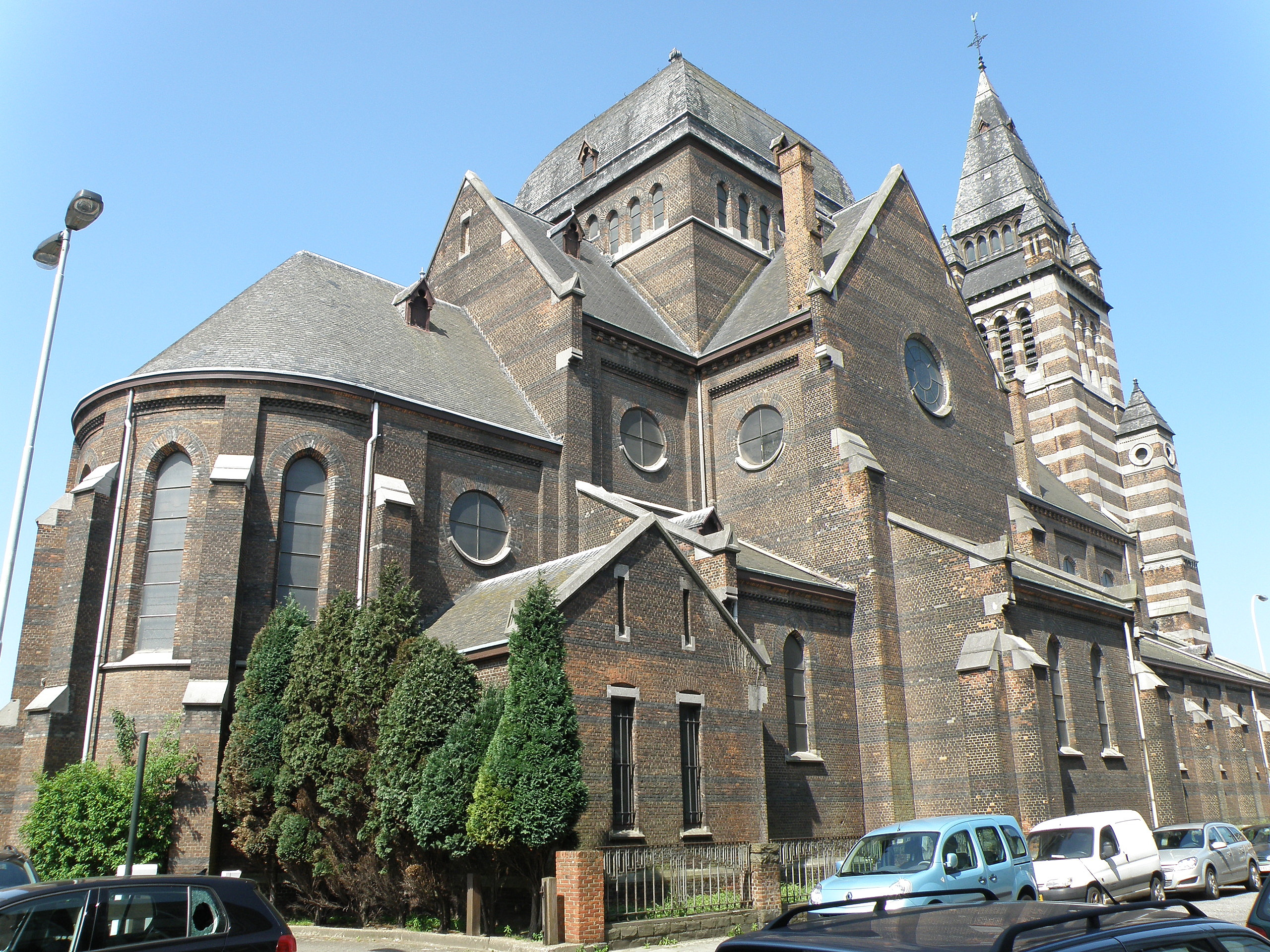 Anvers, Belgique. Église paroissiale Saint-François-d’Assise, située Bredabaan (route de Breda) à Merksem (banlieue nord-est d’Anvers), de style éclectique teinté de néo-byzantin. Architecte : Henri Blomme, date d’achèvement 1896.